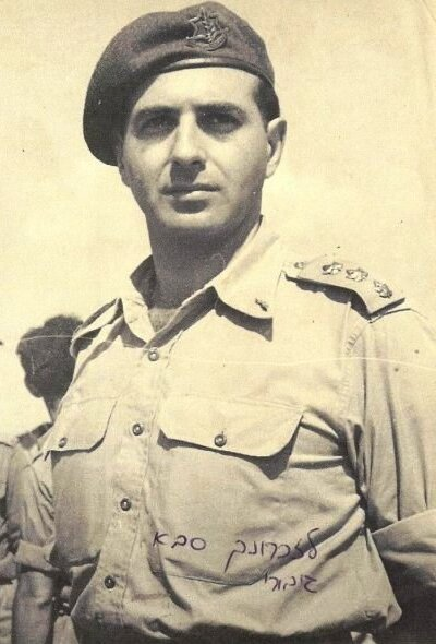 מיכאל מיכאל בשעתו כ אלוף משנה